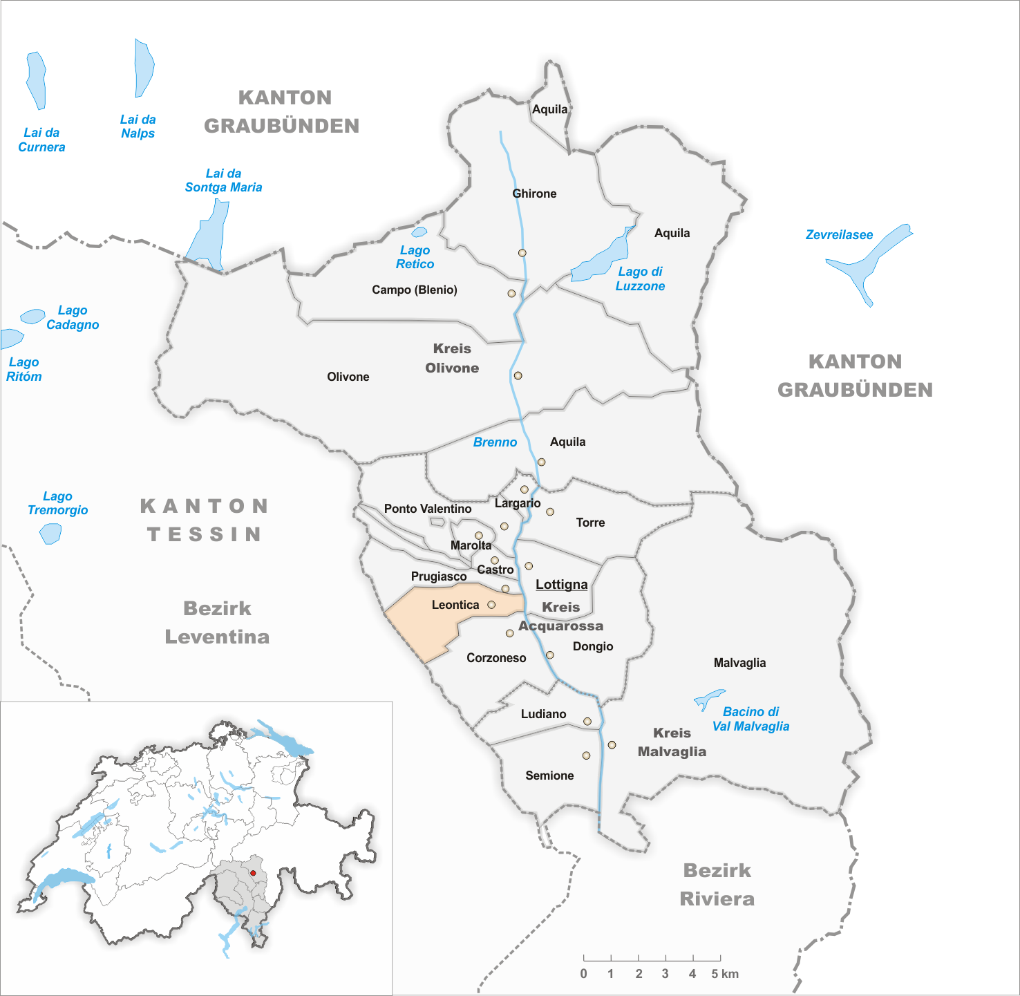 Municipality Leontica